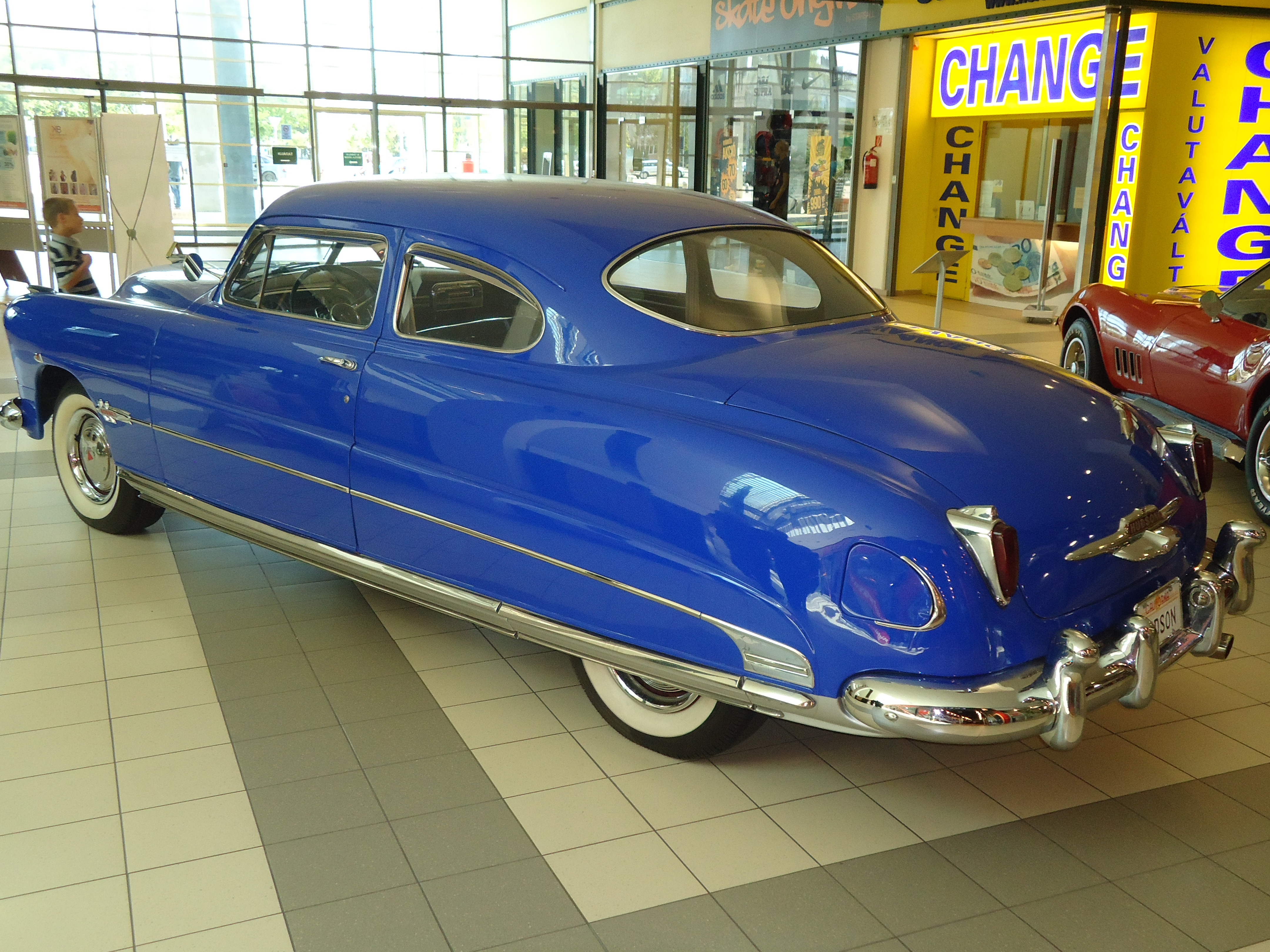 1951-es évjáratú Hudson Hornet Coupe. Erről az autóról mintázták a Verdák című Pixar animációs film Doki karakterét.